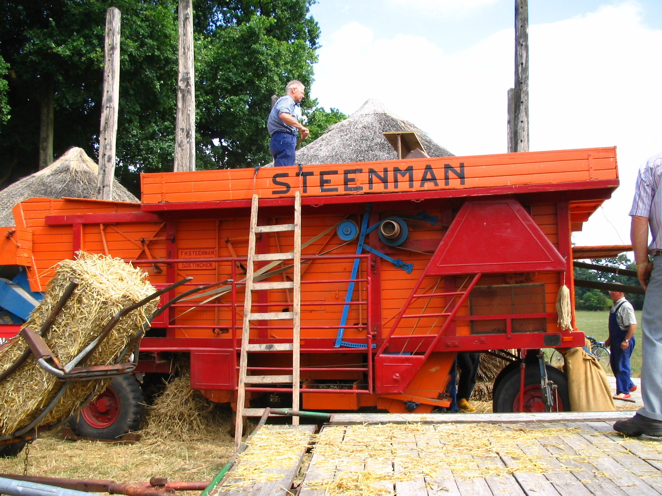 Steenman Dorsmachine Type D.B, foto genomen tijdens de Creative Dag te Laren (gld) in 2006